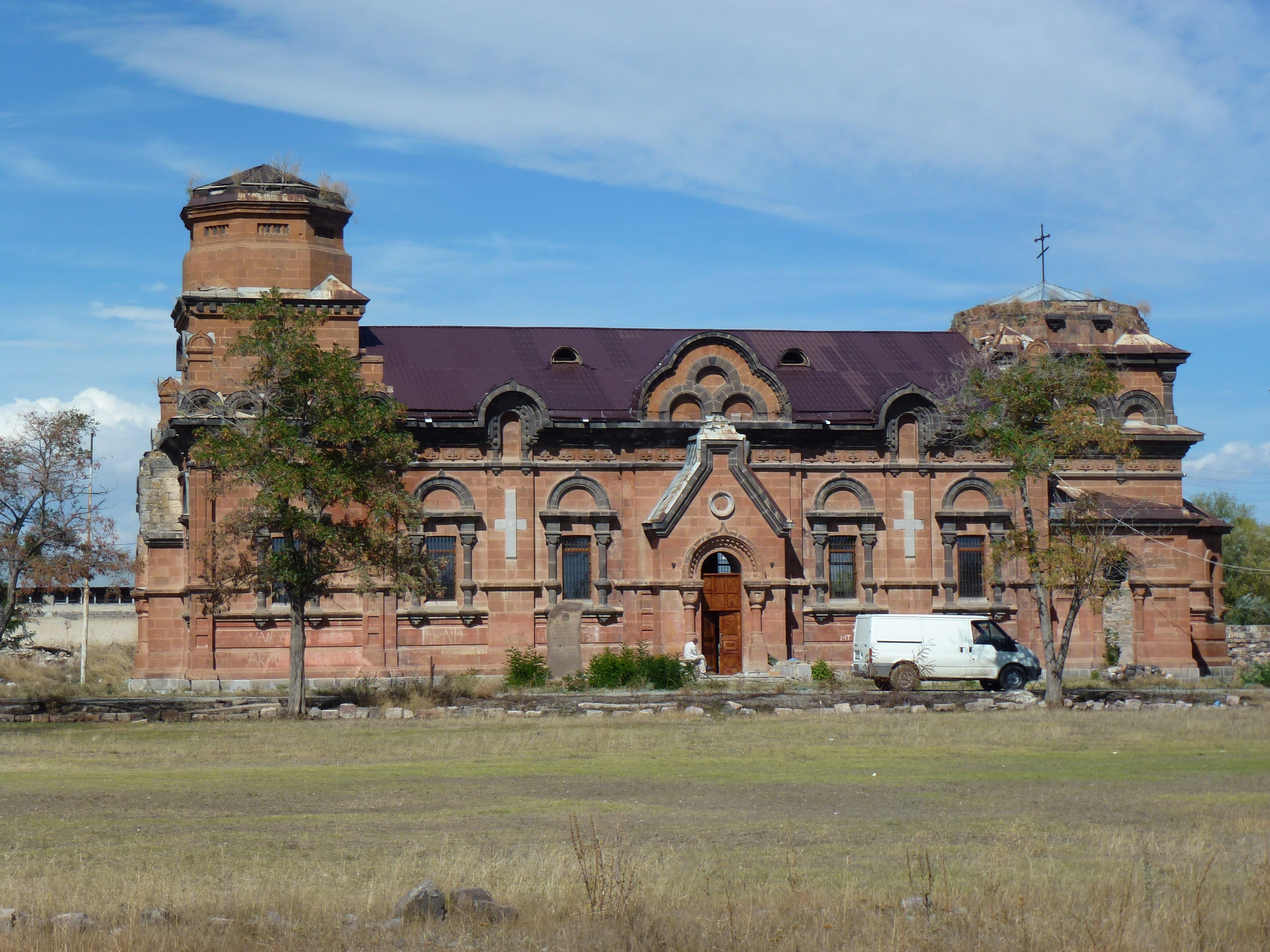 Կազաչի պոստի եկեղեցին Գյումրիում 1/16.5